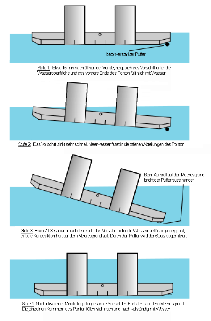 Darstellung der Phasen beim Versenken eines Maunsell Navy Fort. german translation